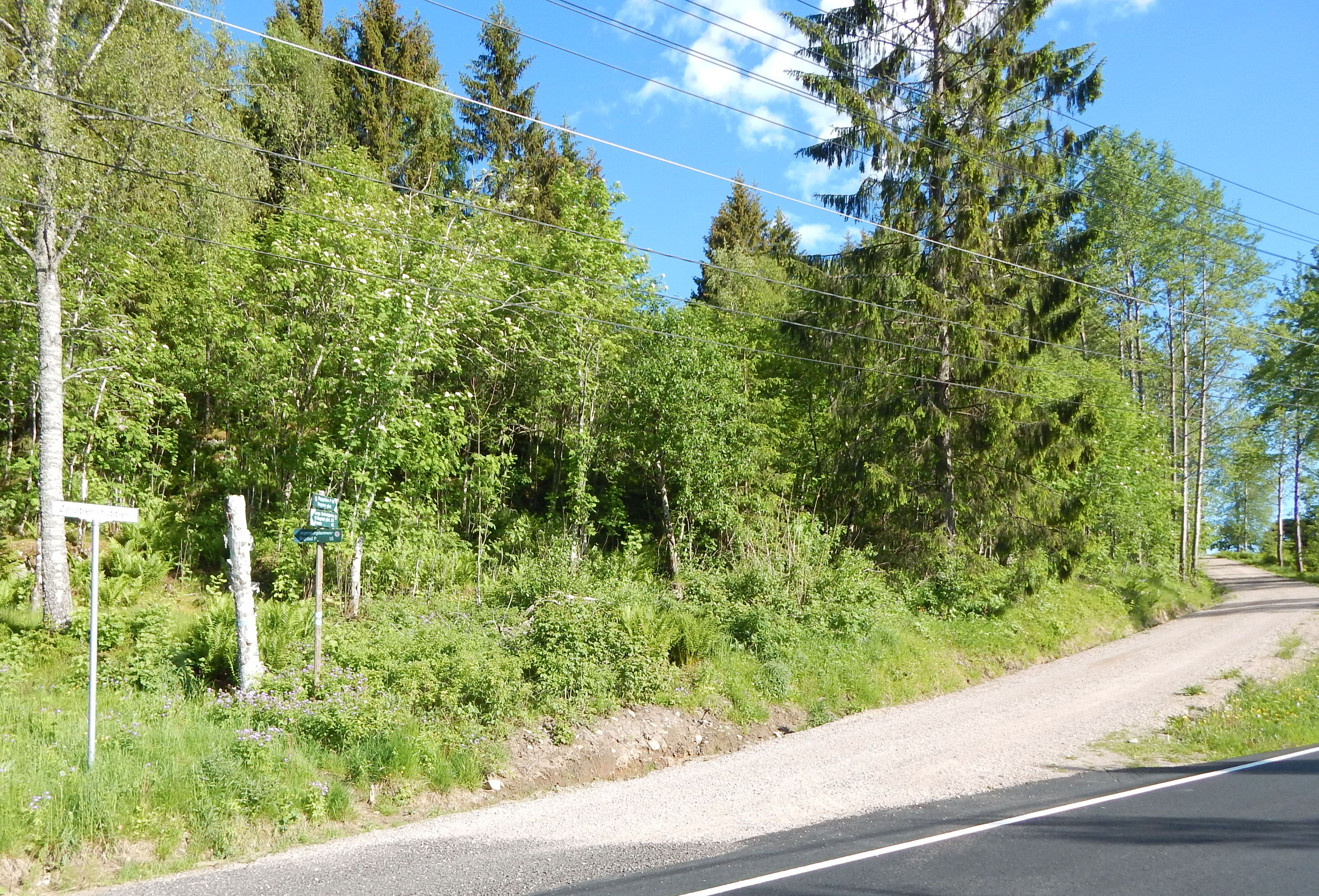 Zinoberstubben